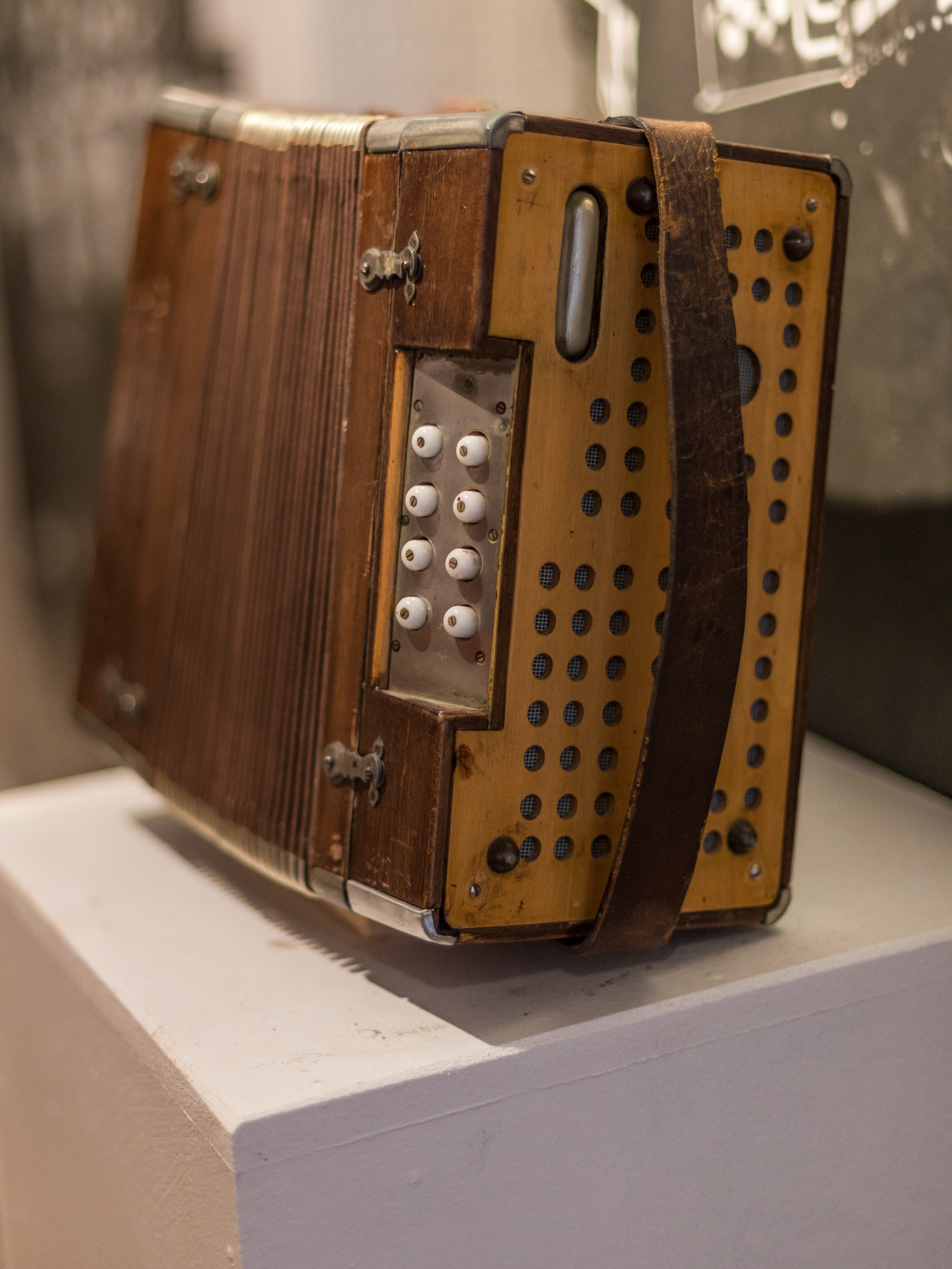 Carl Jularbo Museum, Avesta, Dalarnas län, Sverige